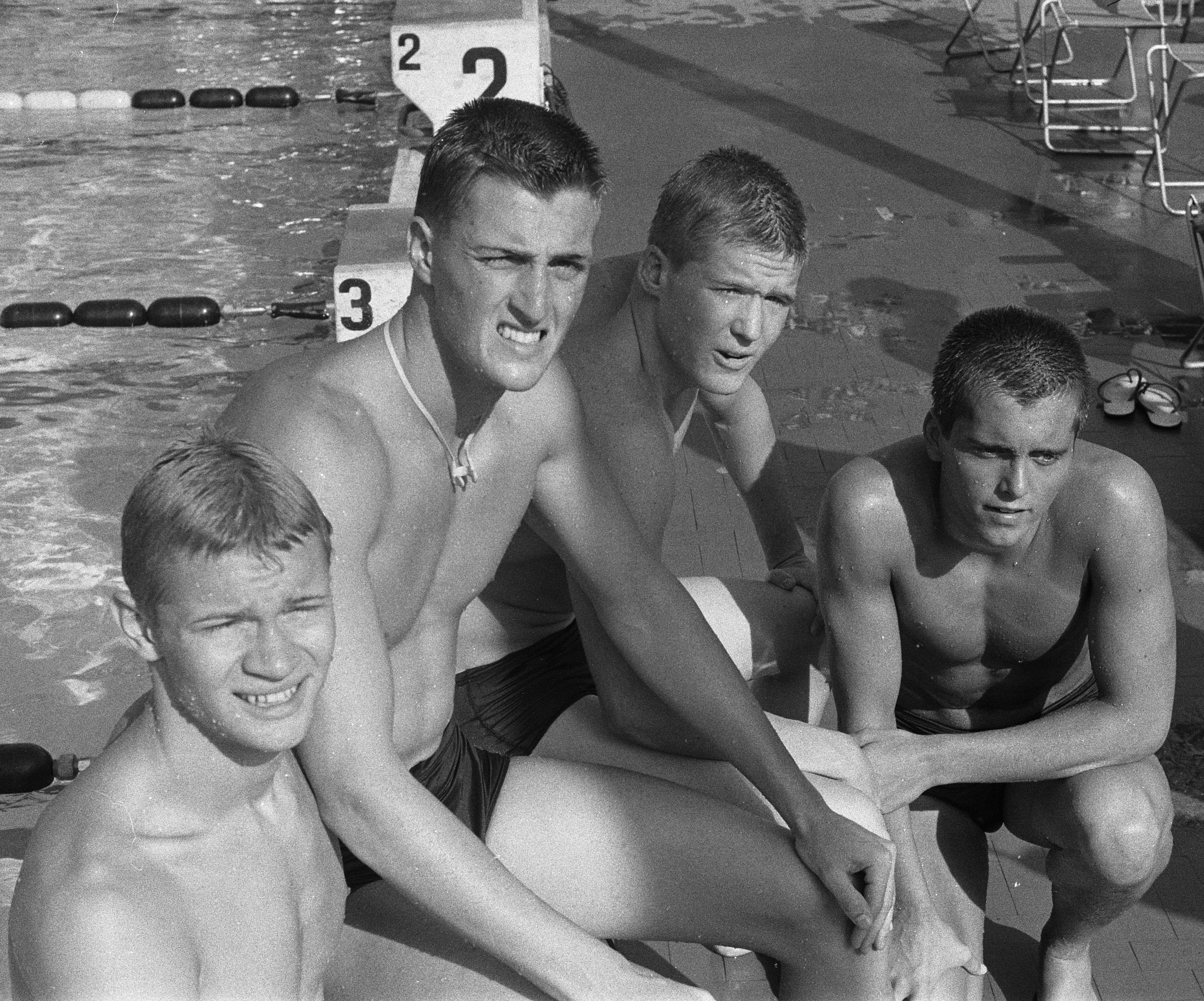 Olympische Spelen te Rome, Amerikaanse estafetteploeg 4x100 meter wisselslag v.l.n.r. Bennett , Hait, Clark en Gillanders. Location: Italië, Rome